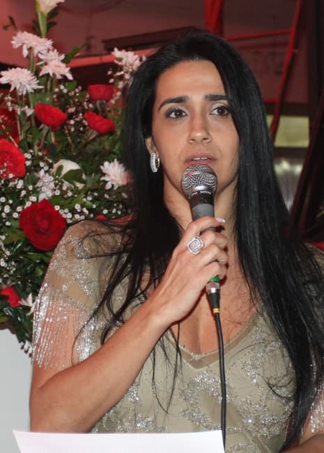 Fotógrafo Henrique Matos